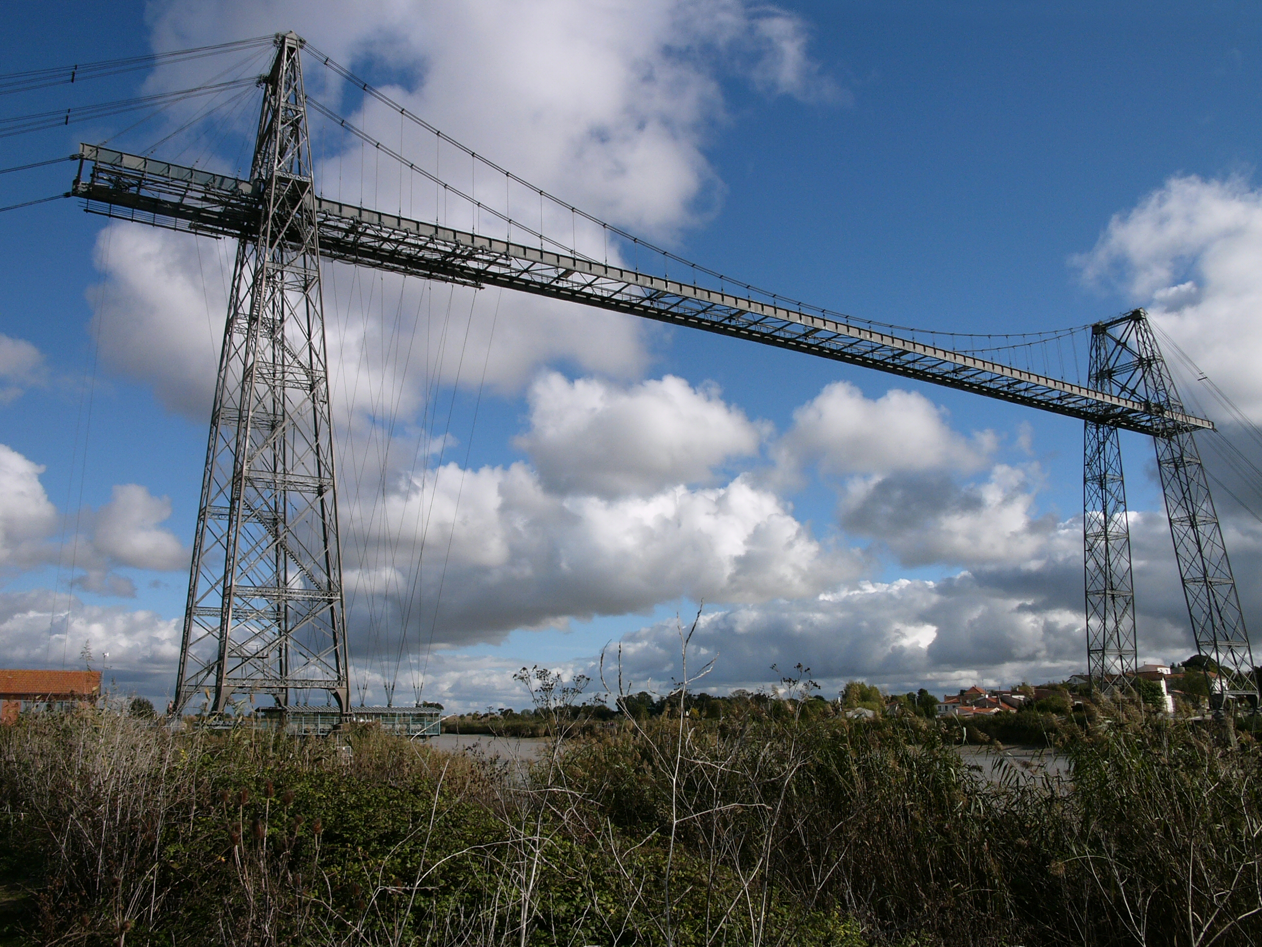 Pont Transbordeur de Martrou Rochefort Charente Maritime France